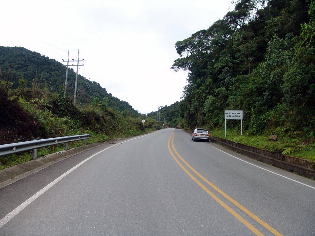 Entre los departamentos de Putumayo y huila